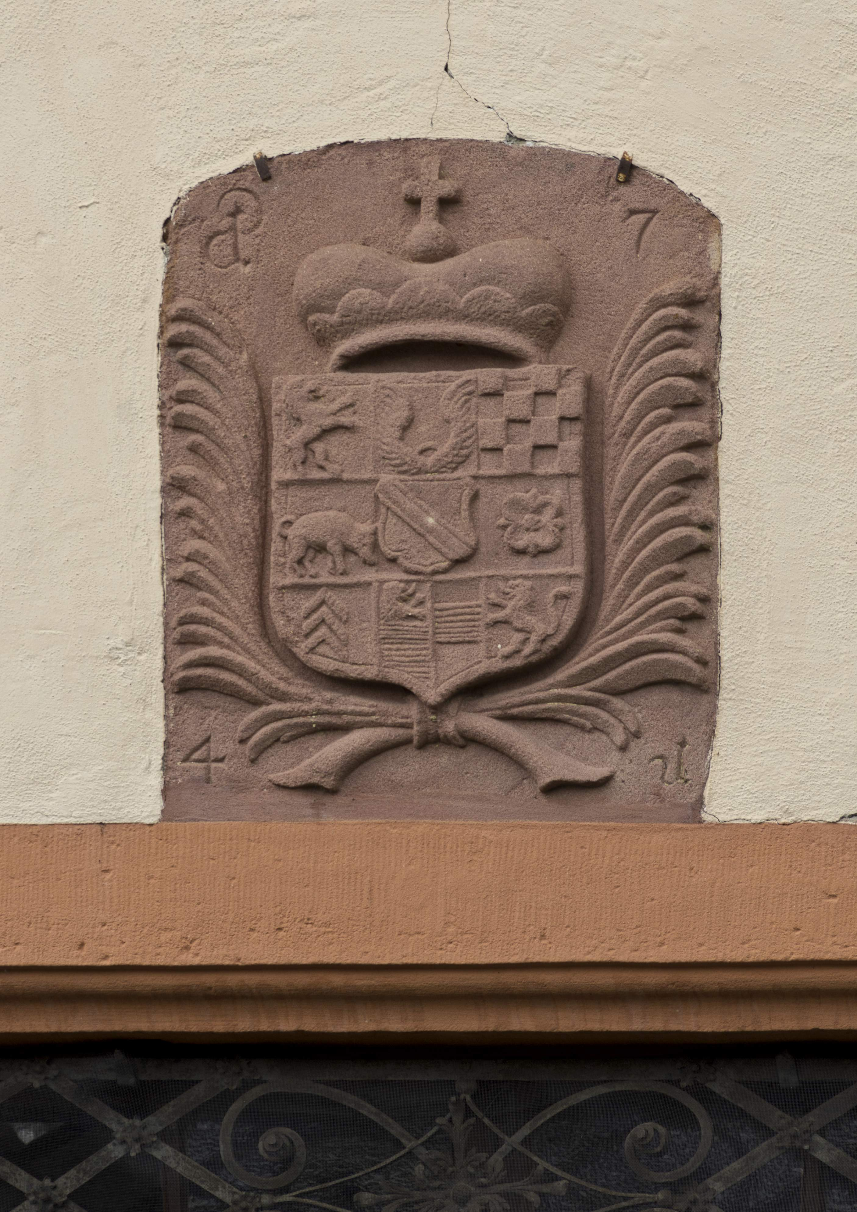 Die Katholische Pfarrkirche in March Holzhausen